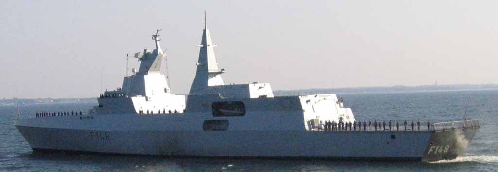 Korvette SAS Mendi F148 in der Neustädter Bucht vor Travemünde